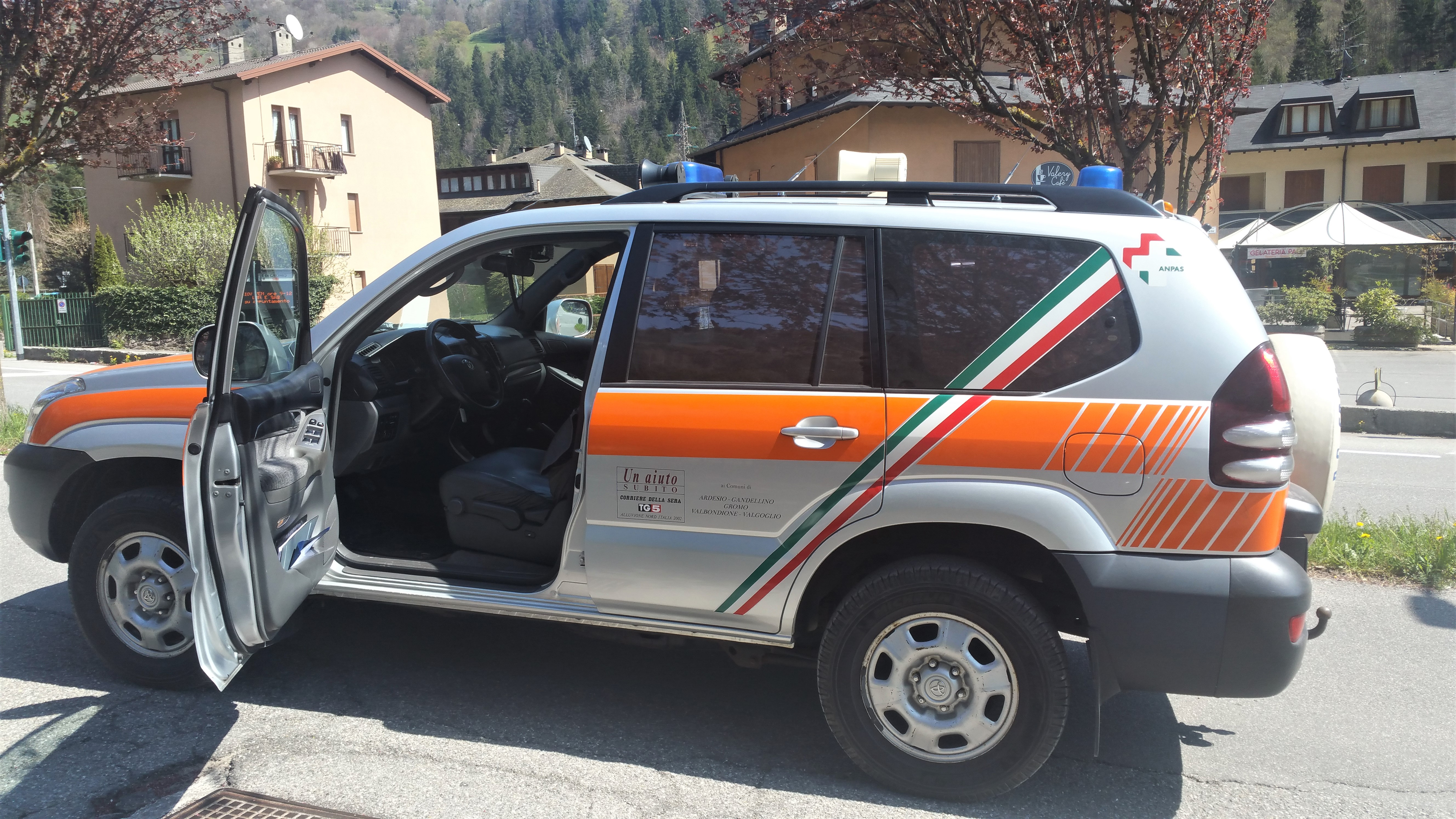 Mezzi della protezione civile a sanificare per covid-19